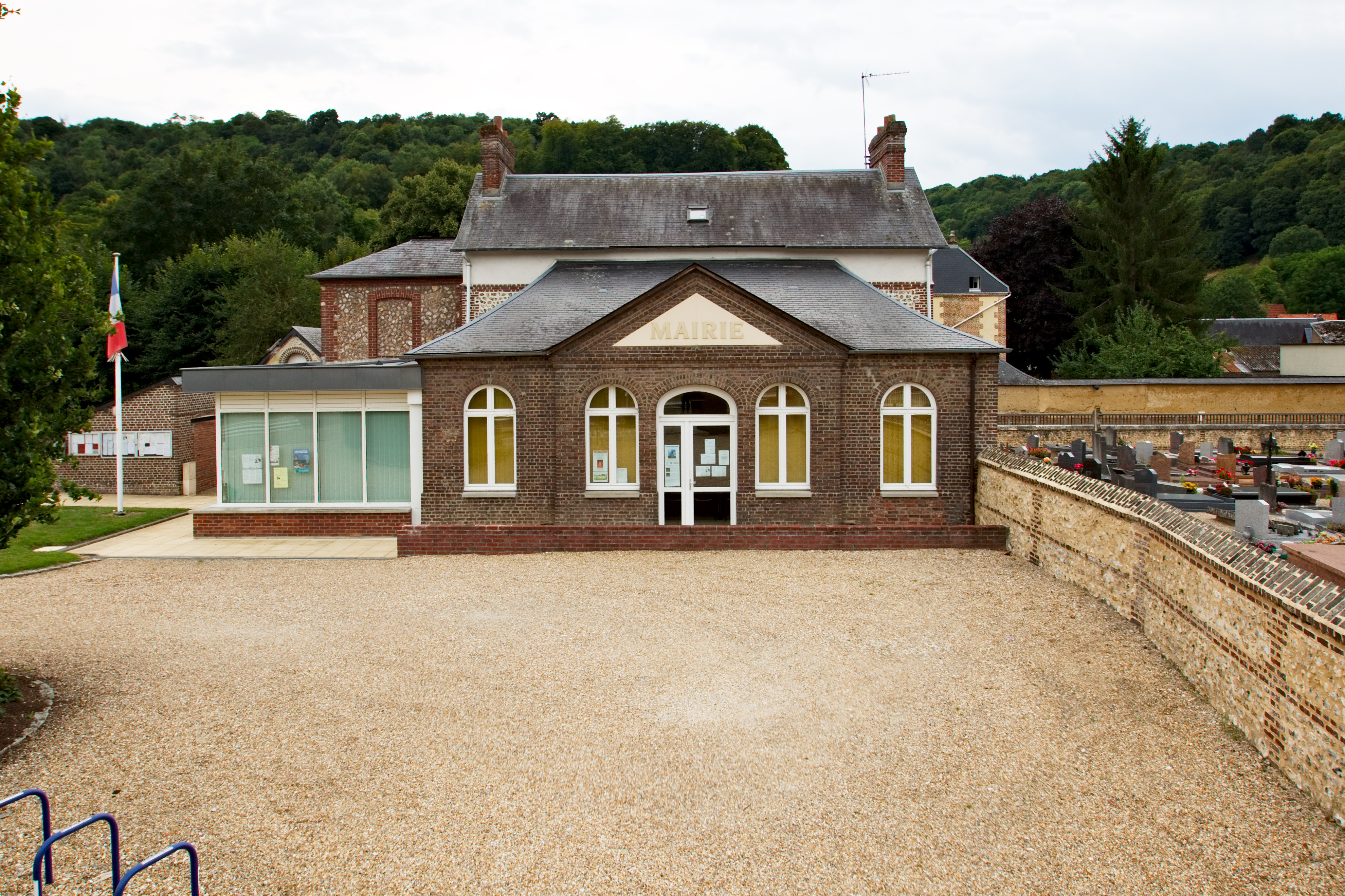 Mairie de Saint-Aubin-Épinay route de Lyons-la-Forêt à Saint-Aubin-Épinay